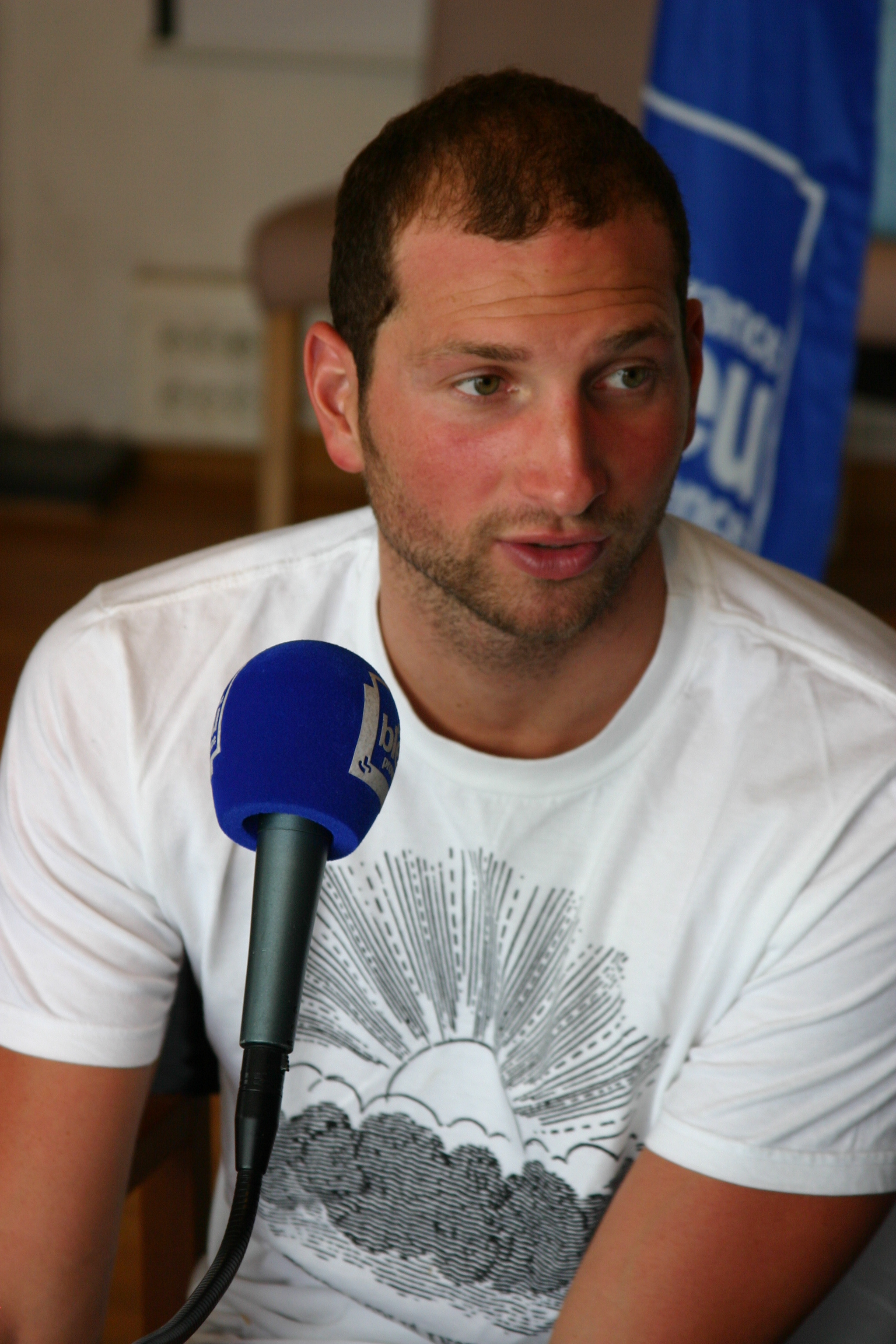 William Meynard au Cercle des Nageurs de Marseille sur France Bleu Provence